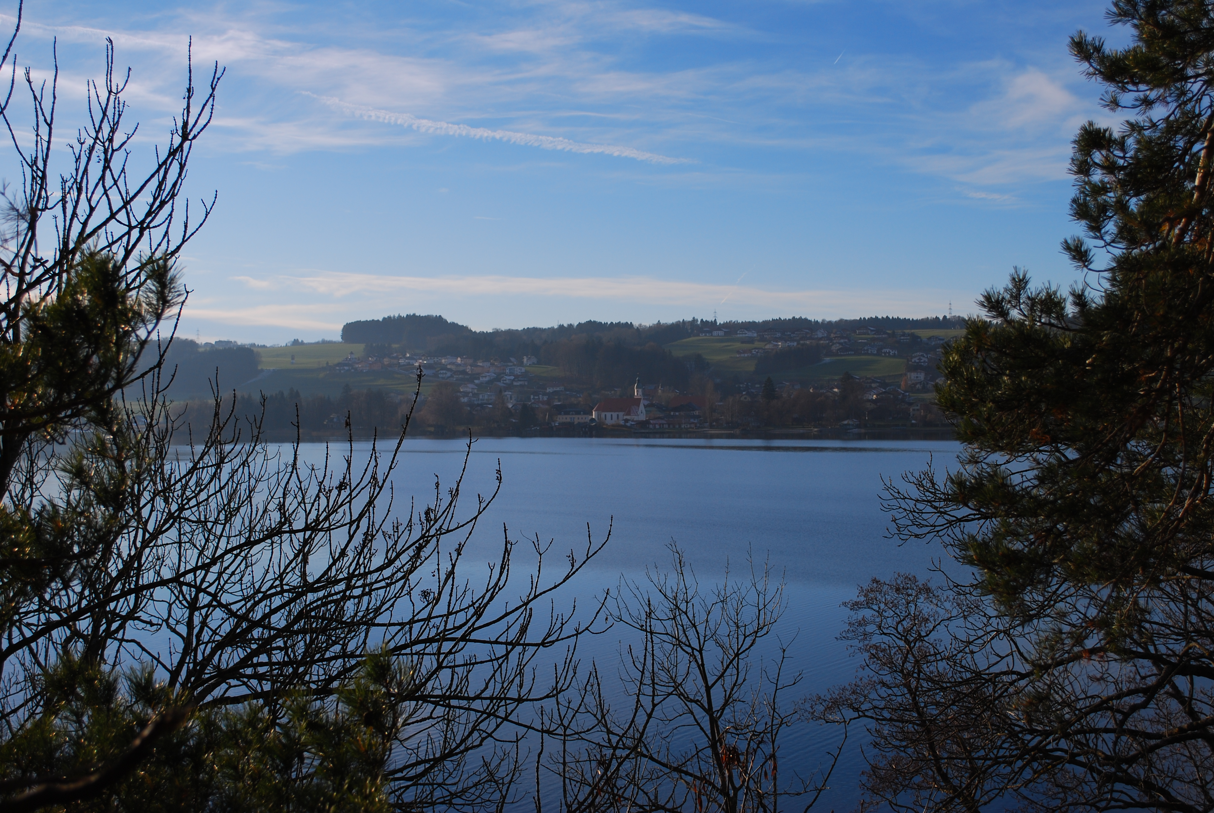 Seeham am Obertrumer See, vom Wartstein aus gesehen